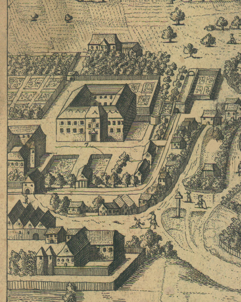 Fragment wydanej w Paryżu w I poł. XVII w., z opisami w języku francuskim, panoramy nieznanego autora, replika widoku M. Meriana z 1619 roku. Jej tytuł (w tł.): "Kraków nad Wisłą. Miasto w wysokiej Polsce. Stolica Królestwa, z Uniwersytetem i Biskupstwem, Arcybiskupstwa Gnieźnieńskiego. Była siedziba królów". Na tym fragmencie widoczny zespół folwarczny w Łobzowie z pałacem królewskim